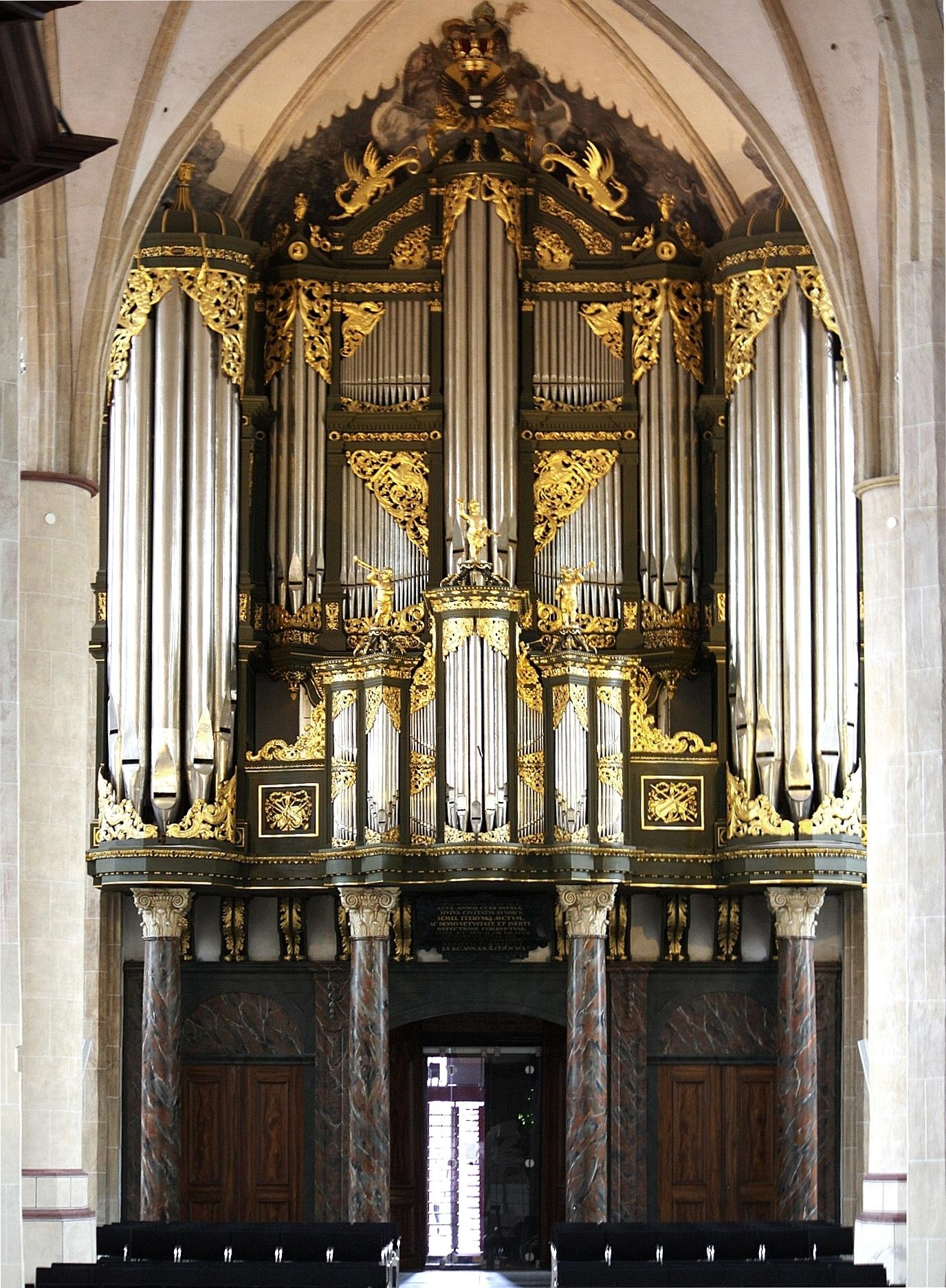 Schnitger organ Groningen Martinikerk